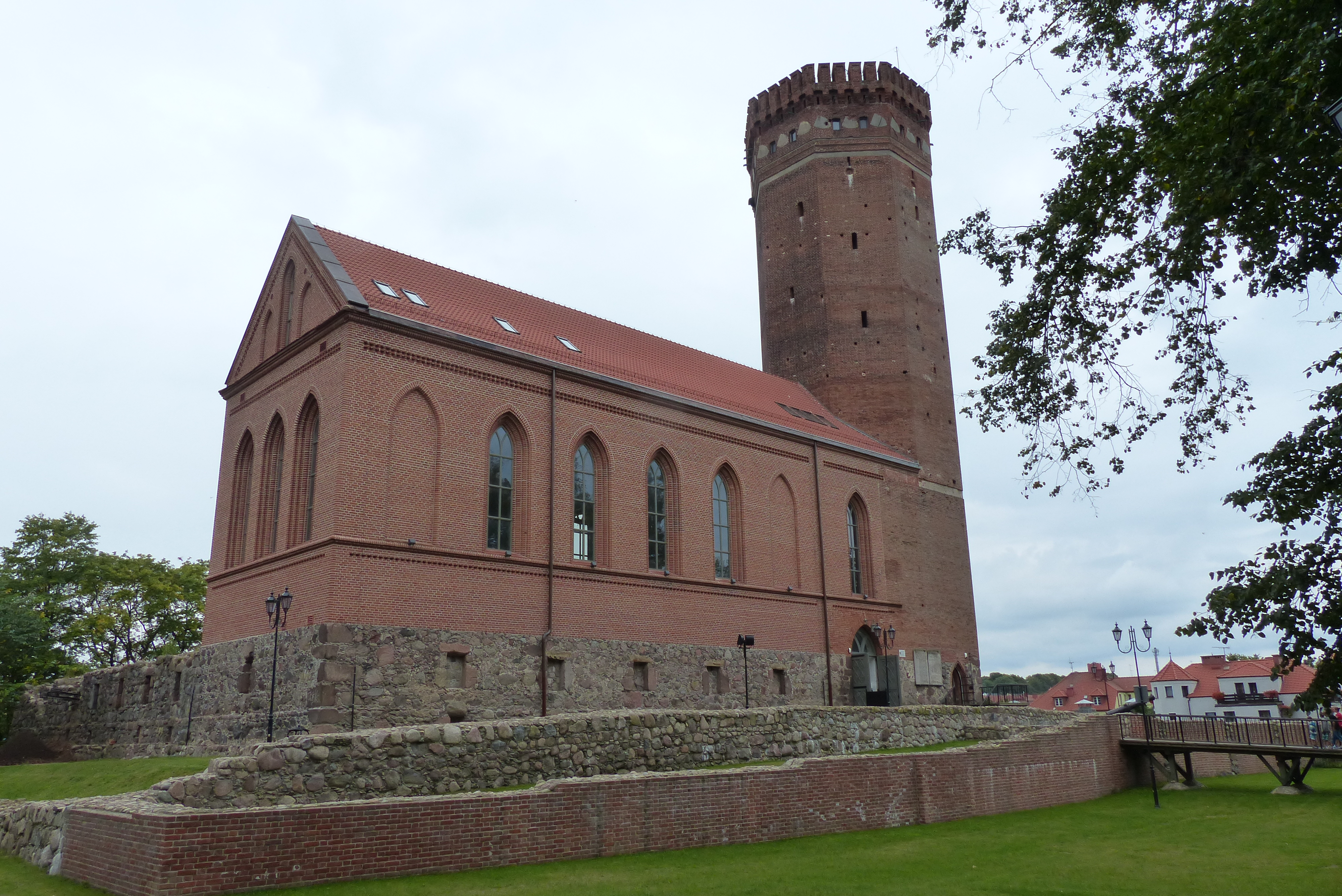 Czluchow, Poland